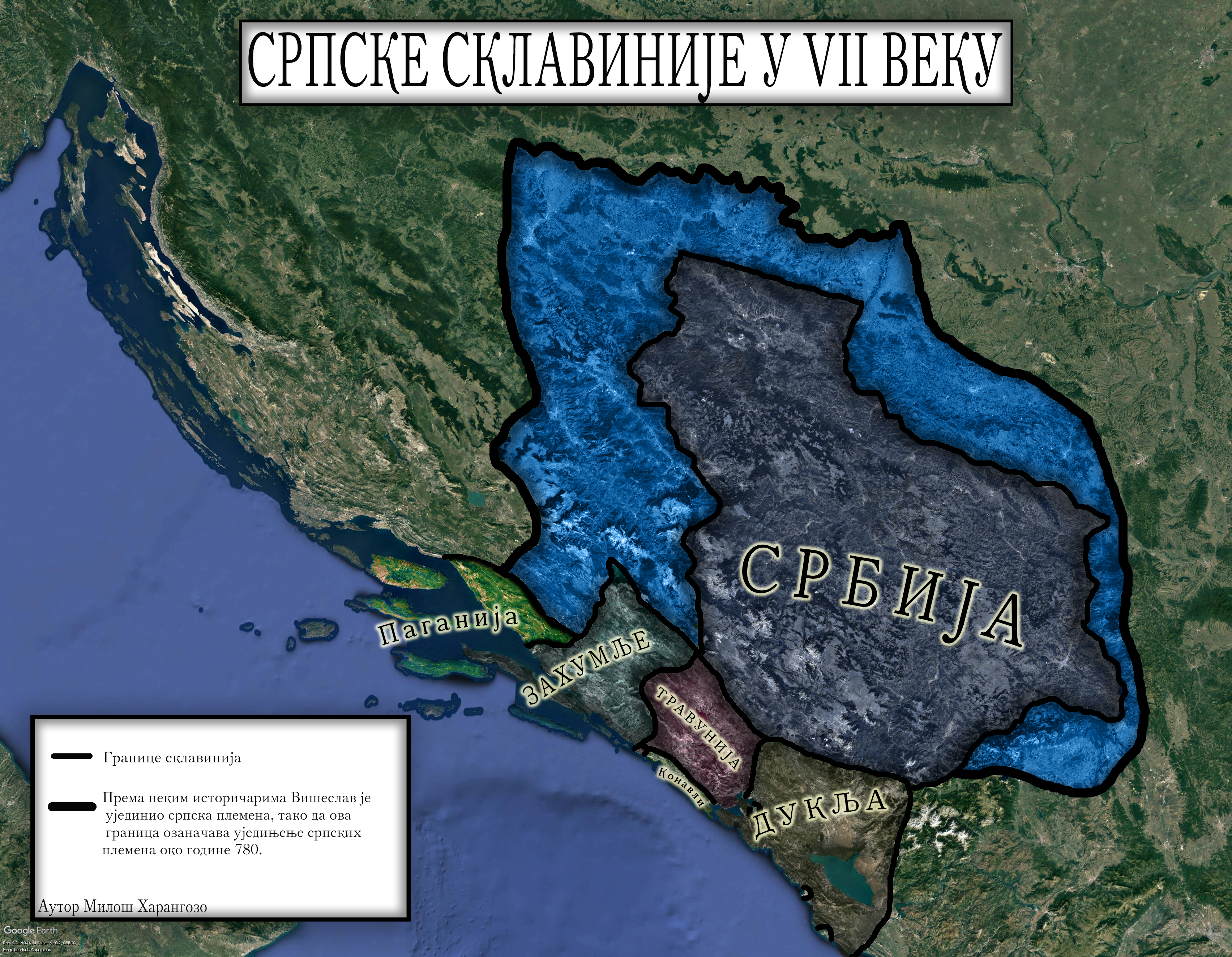 Српске склавиније у 7. и 8. веку.